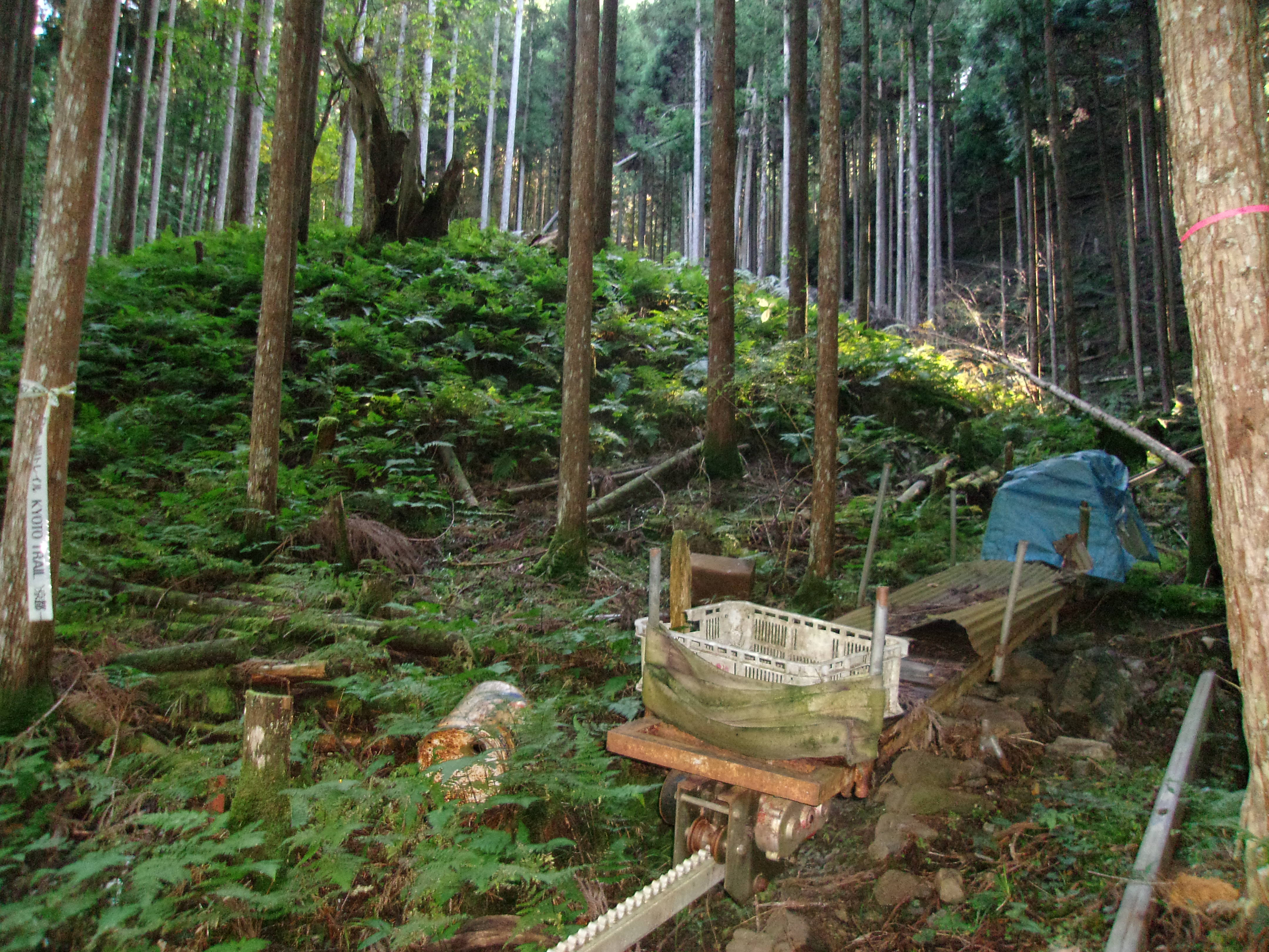 北山杉林業のためのモノレール（京都市右京区京北細野町にて）